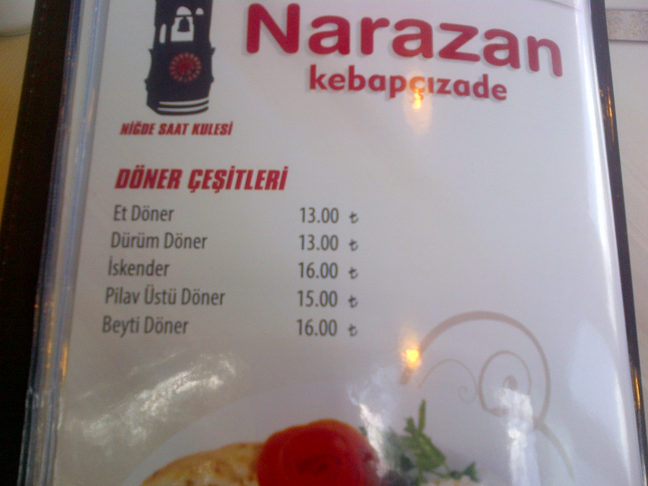 Döner no se considera un "kebap". Los variantes de döner en la lista de comidas de un restaurante turco. Las variedades de "kebap" se encuentran en otra pagina.